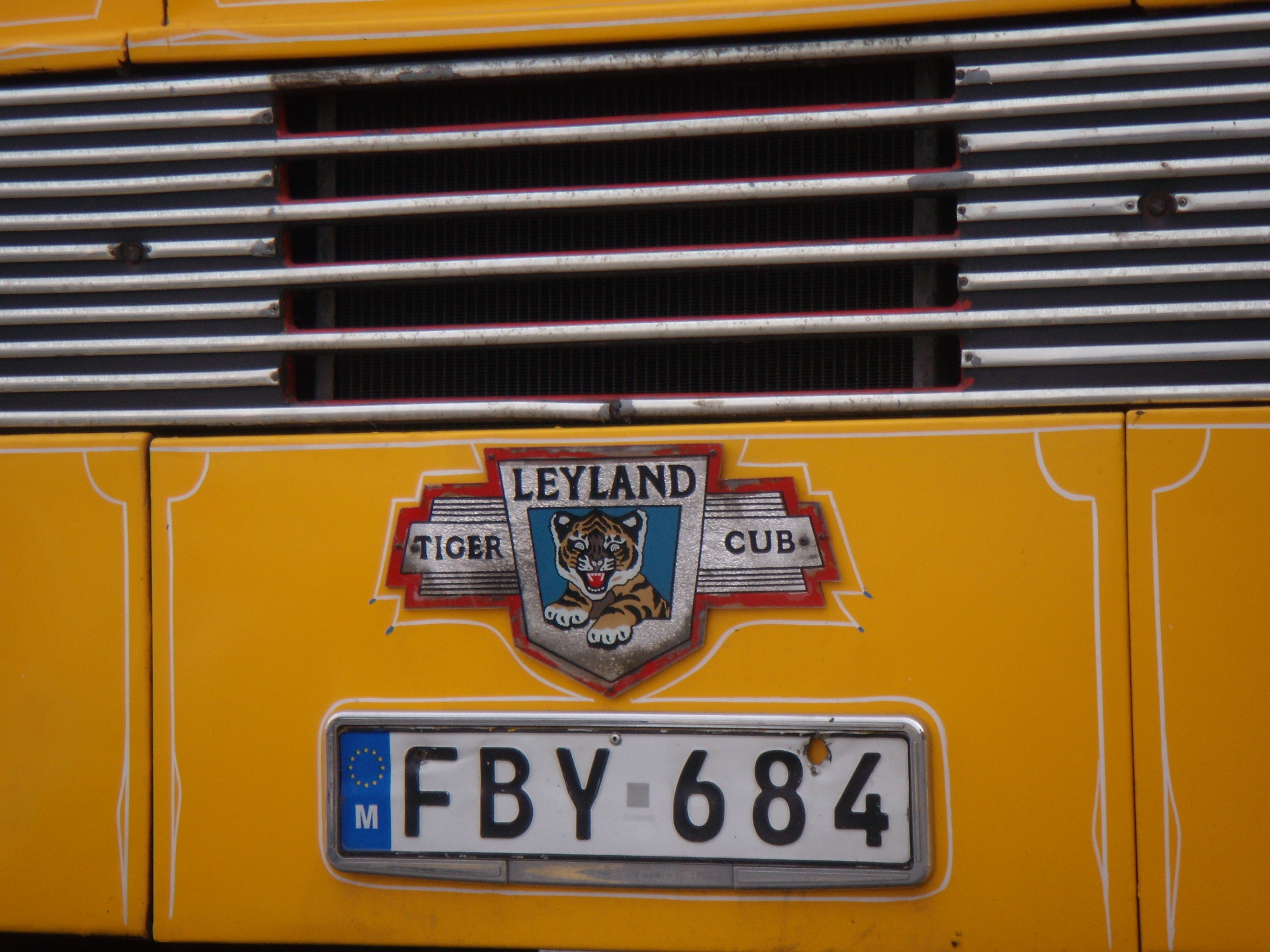 Malta bus